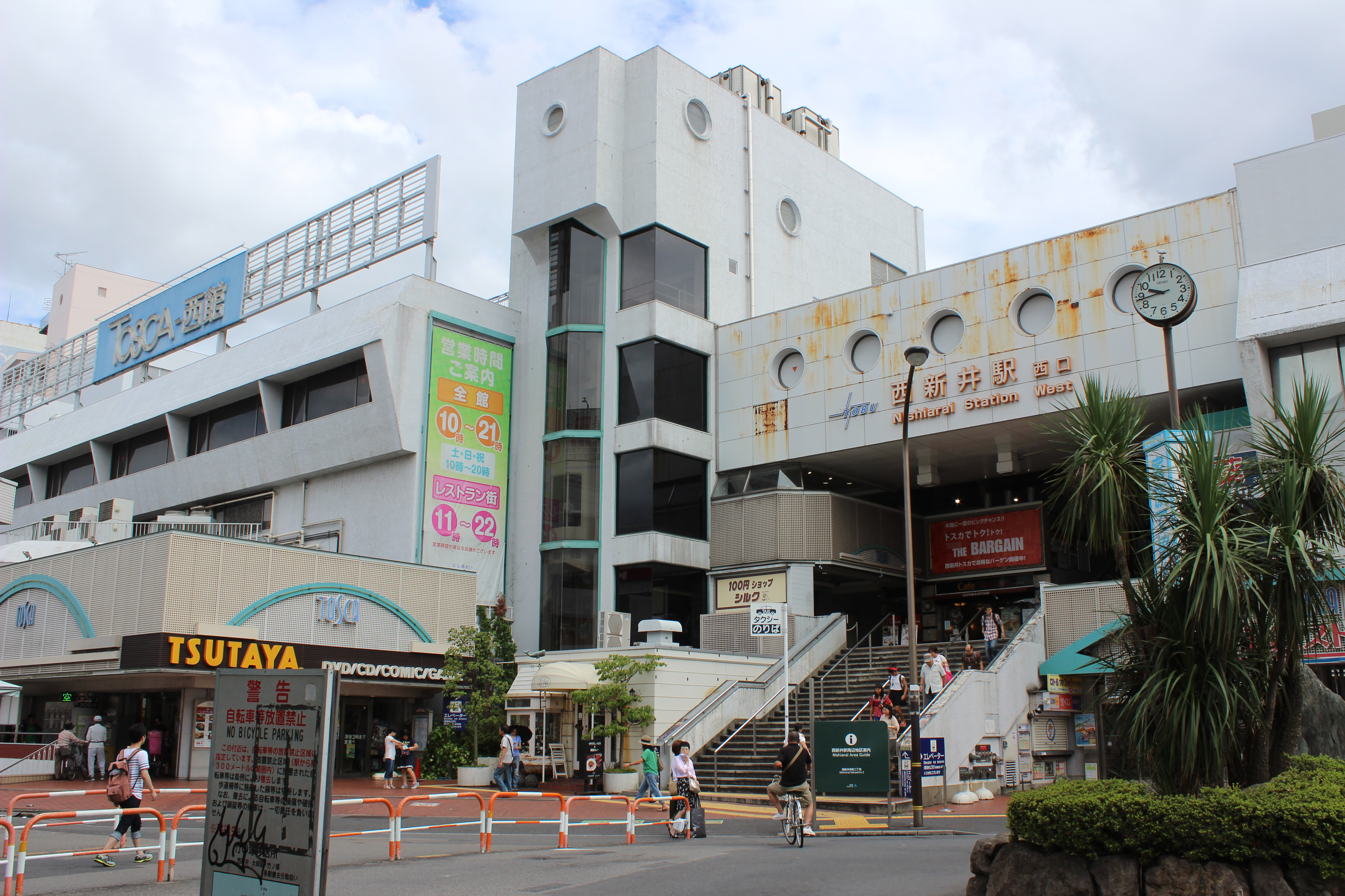 西新井駅西口